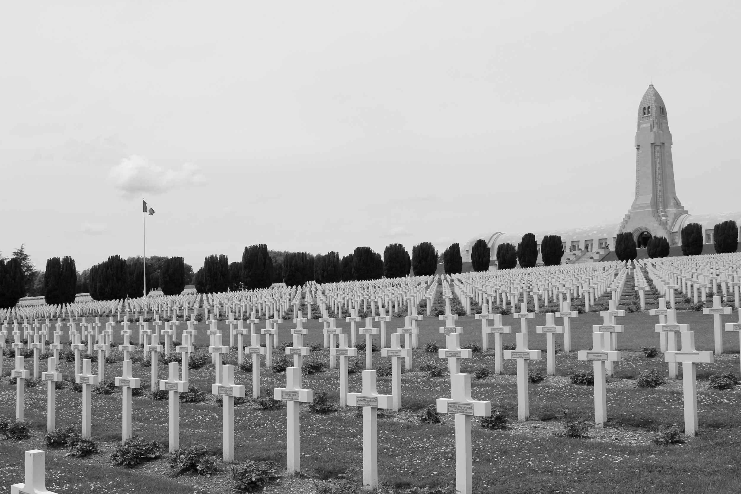 Zentraler Kriegsgräberfriedhof der Schlacht um Verdun bei Douaumont.